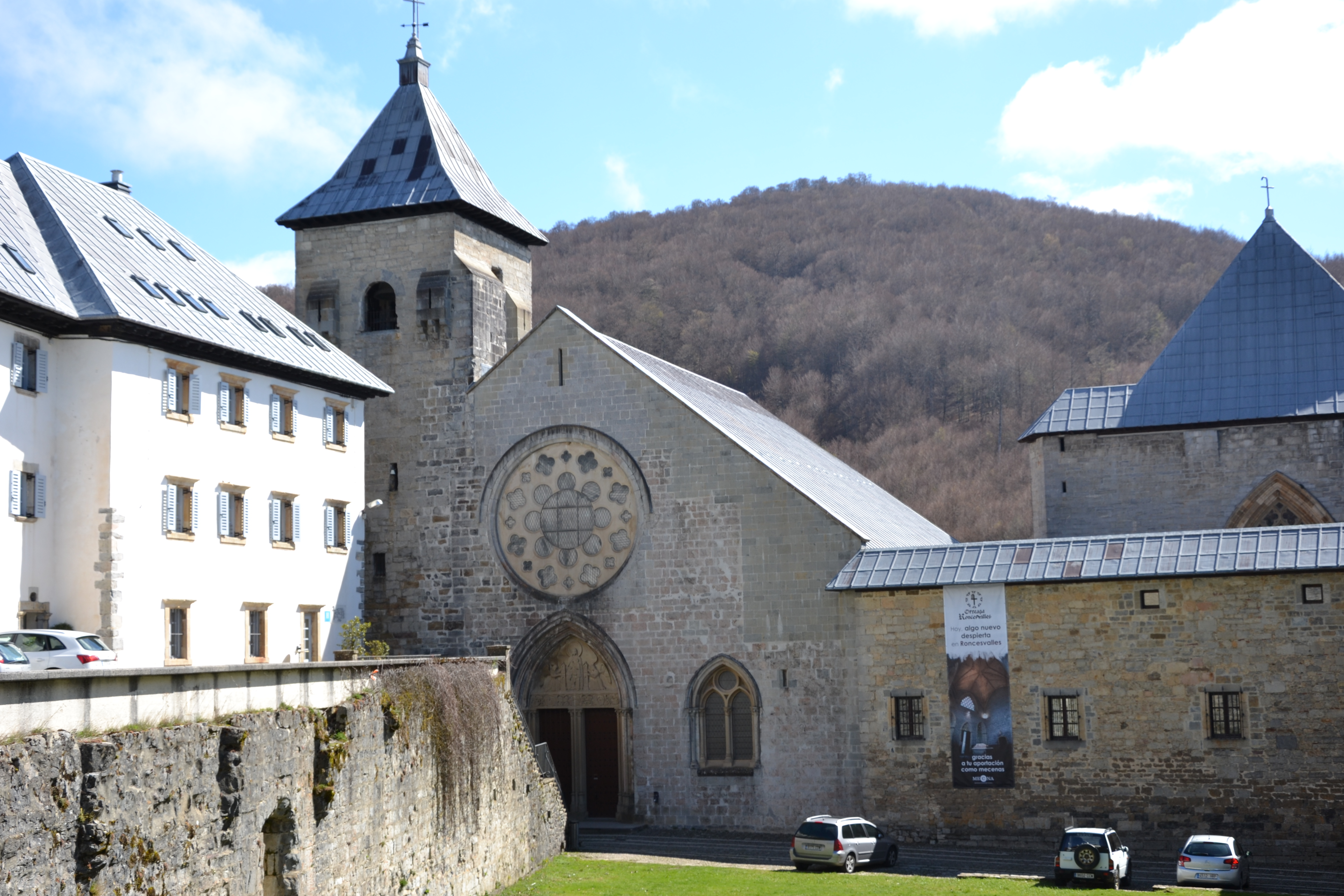 Collégiale Sainte Marie de Ronceveau